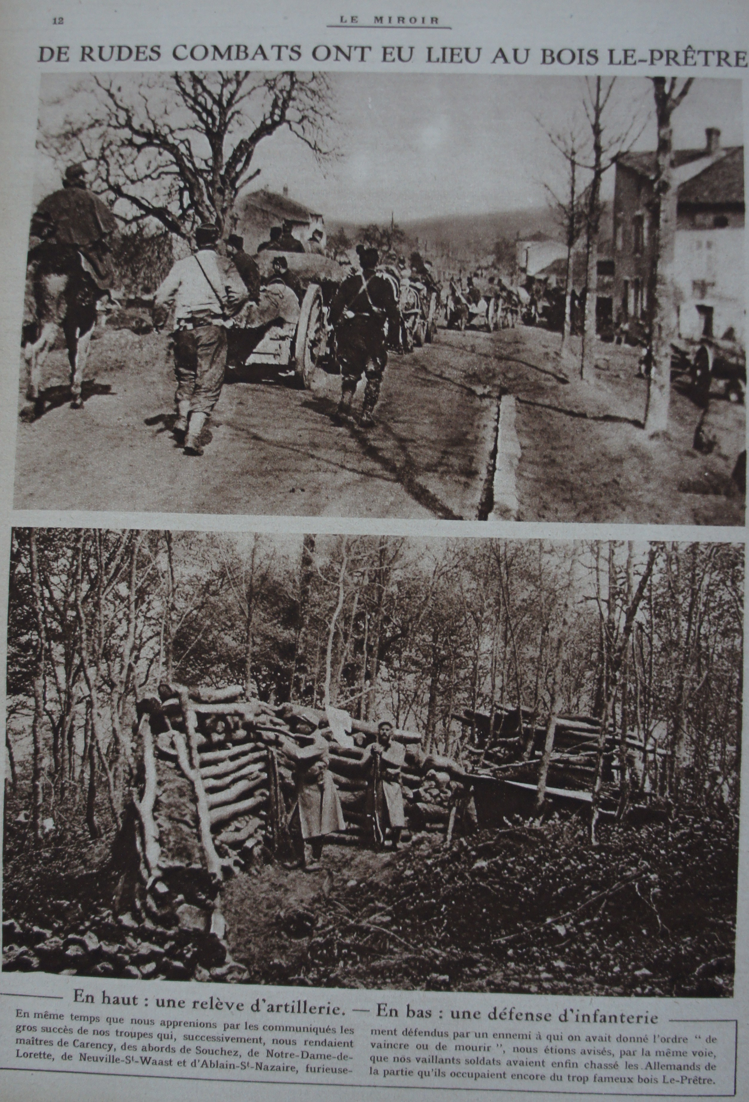 publié dans le magazine le Miroir n° 80 page 12